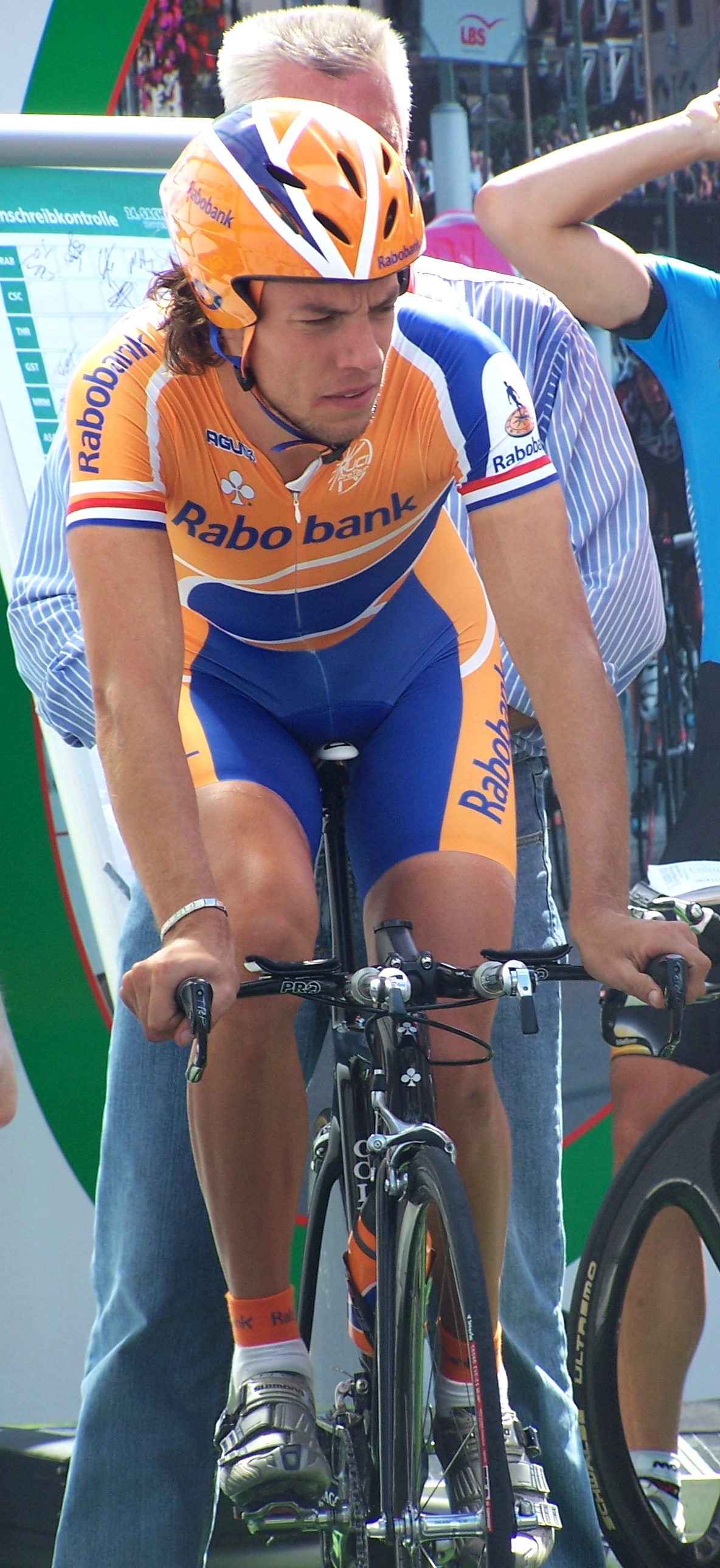 Die Aufnahme entstand beim Einzelzeitfahren der Sachsen-Tour 2008 in Großenhain